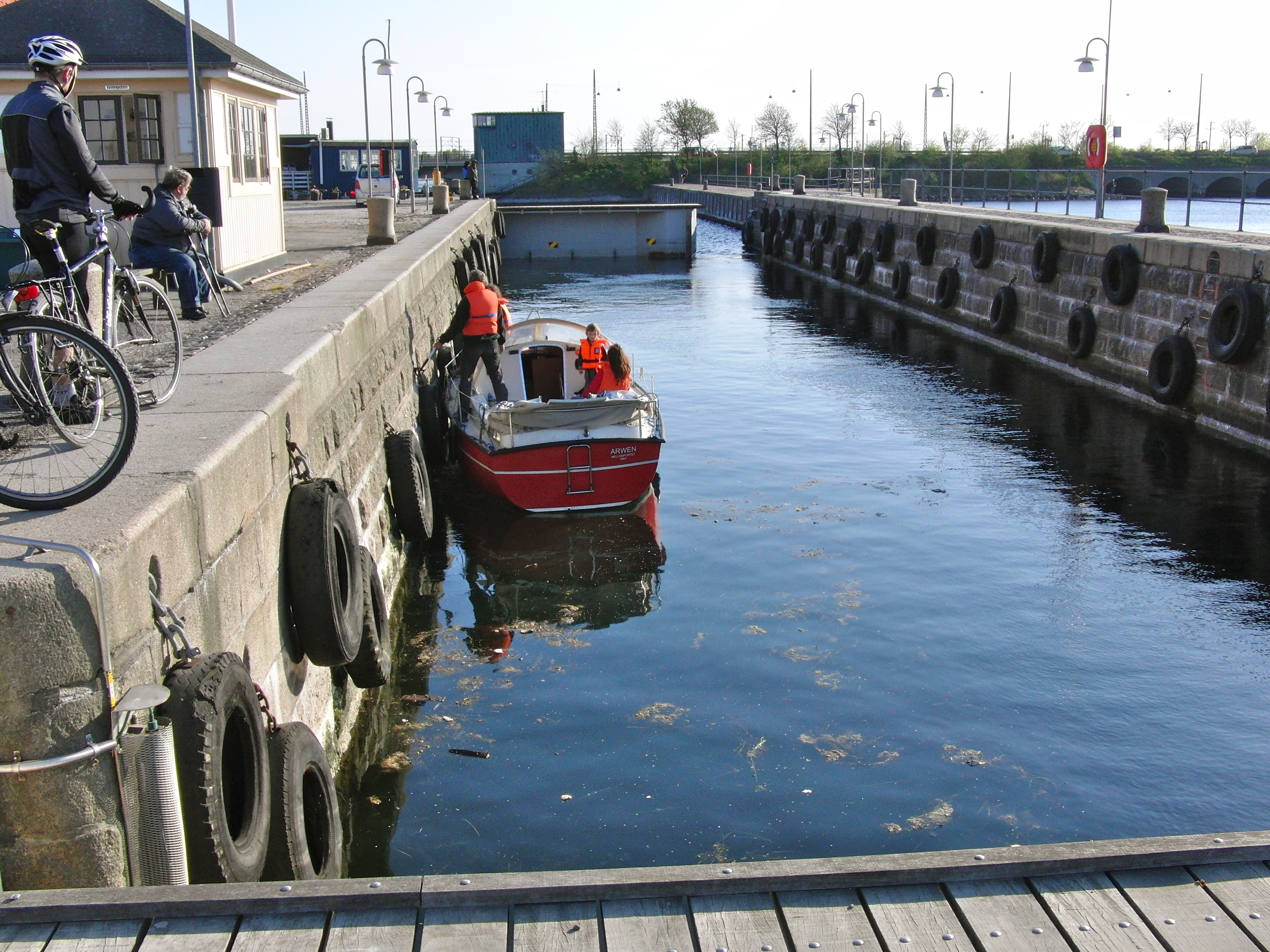 Sluseanlægget i Københavns Havn. Sejlbåd uden mast klarer frihøjden på 3 meter under broerne